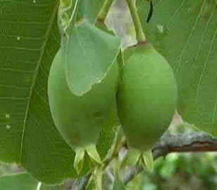 fruits of Planchonia careya